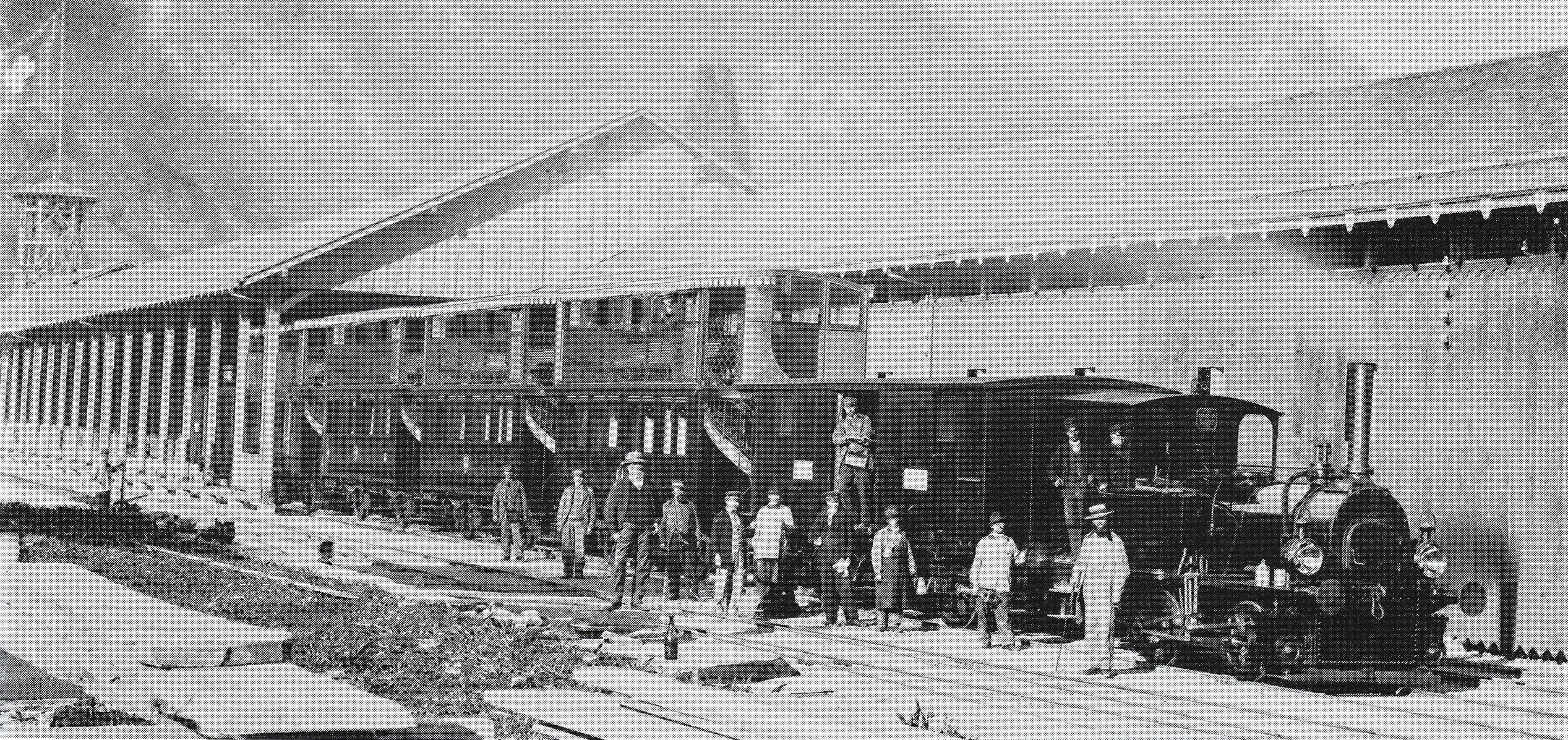 Zug der Bödelibahn mit Doppelſtockwägen, gezogen von der Tender-Locomotive E2 Nr. 2 Föhn der Bödelibahn, gebaut 1872 von Krauß & Cie. zů München (Fabr.-Nr. 224), 1895 außer Dienſt geſtellt und anſchließend abgebrochen.